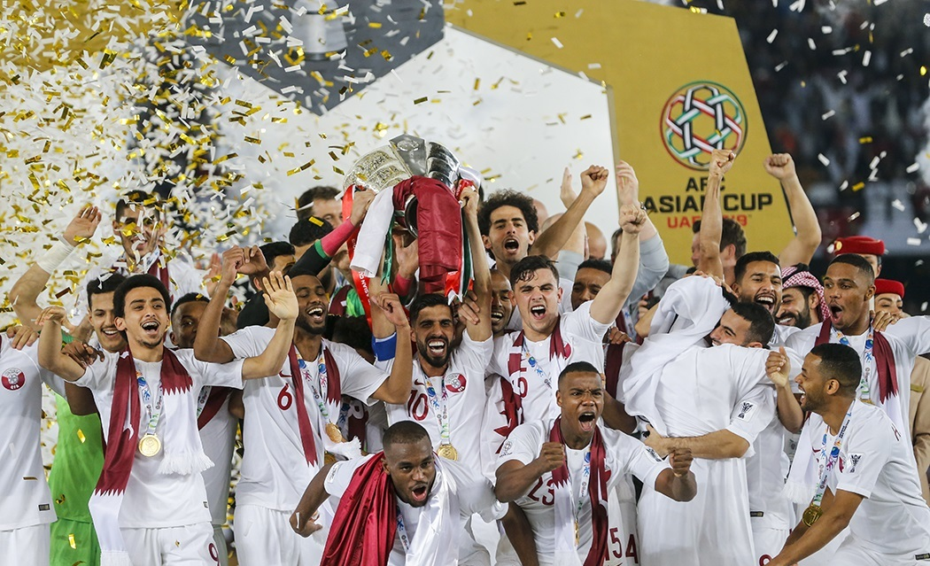 دیدار فینال جام ملت‌های 2019 آسیا بین تیم ملی فوتبال قطر و ژاپن بعدظهر جمعه 12 بهمن در ورزشگاه زاید به قضاوت روشن ایرماتوف ازبکستانی برگزار شد.المعزعلی در دقیقه 12 و عبدالعزیر حاتم 27 و اکرم عفیف در دقیقه 83 با ضربه پنالتی برای قطر گلزنی کردند.برای ژاپن مینامینو 69 موفق به گشودن دروازه قطر شدند.